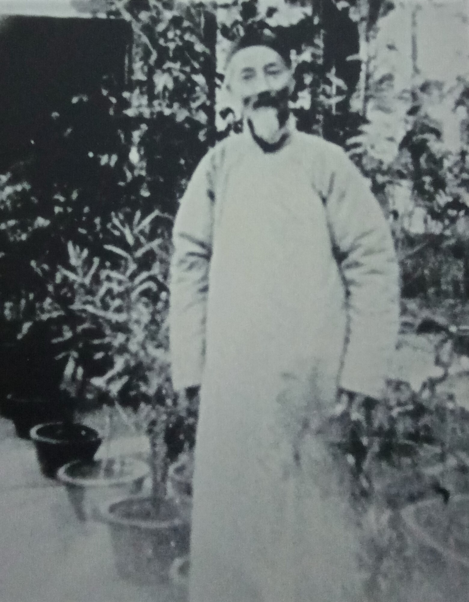 中文（中国大陆）: 大理州博物馆-人像-赵式铭